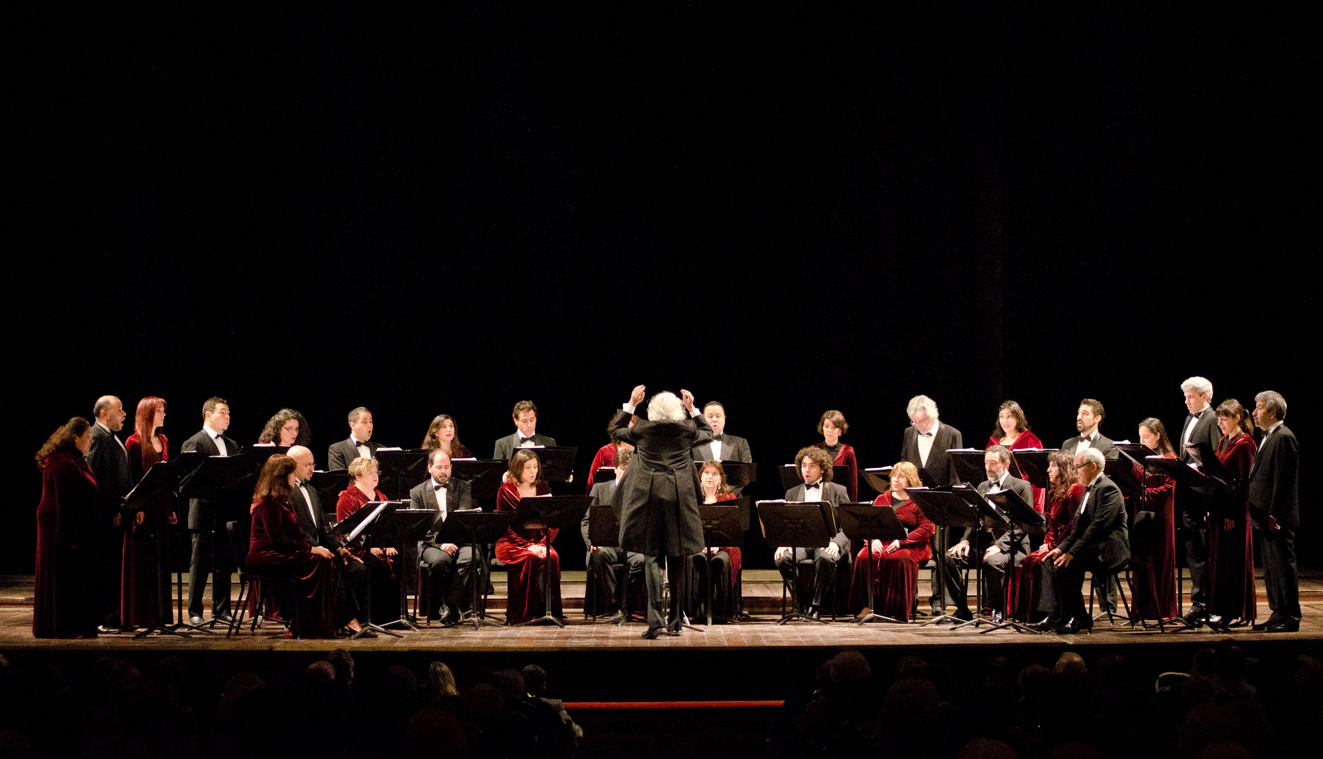 Estudio Coral de Buenos Aires. Teatro Colón, 2011.